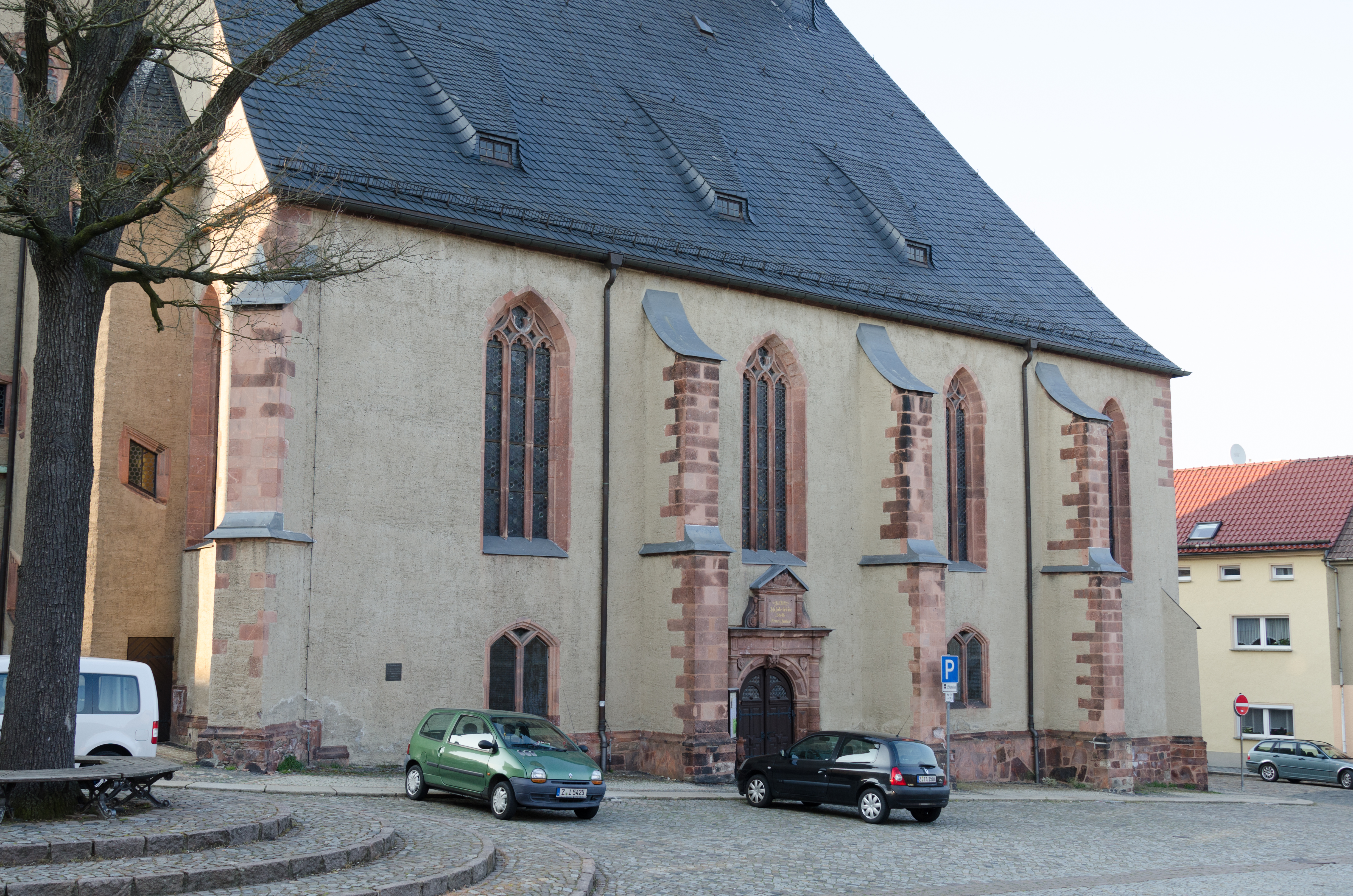 Waldenburg, Ev. Bartholomäuskirche